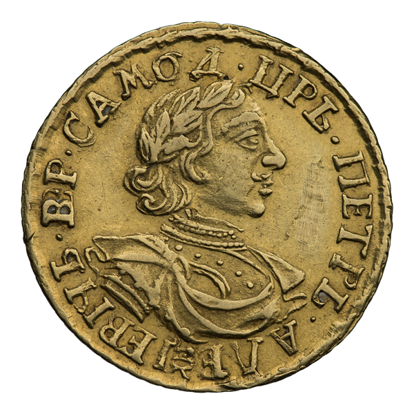 Два рубля 1718 г. (аверс). ГМ LXXXVII.7; Биткин 68 (R). Погрудный портрет царя в лавровом венке, вправо; в латах и мантии. Точки разделяют круговую надпись; заклёпки на груди. Круговая надпись: В[СЕА] Р[ОСИІ] ∙ САМОД[ЕРЖЕЦЬ] ∙ Ц[А]РЬ ∙ ПЕТРЬ ∙ АЛЕѮІЕВІЧЬ ∙